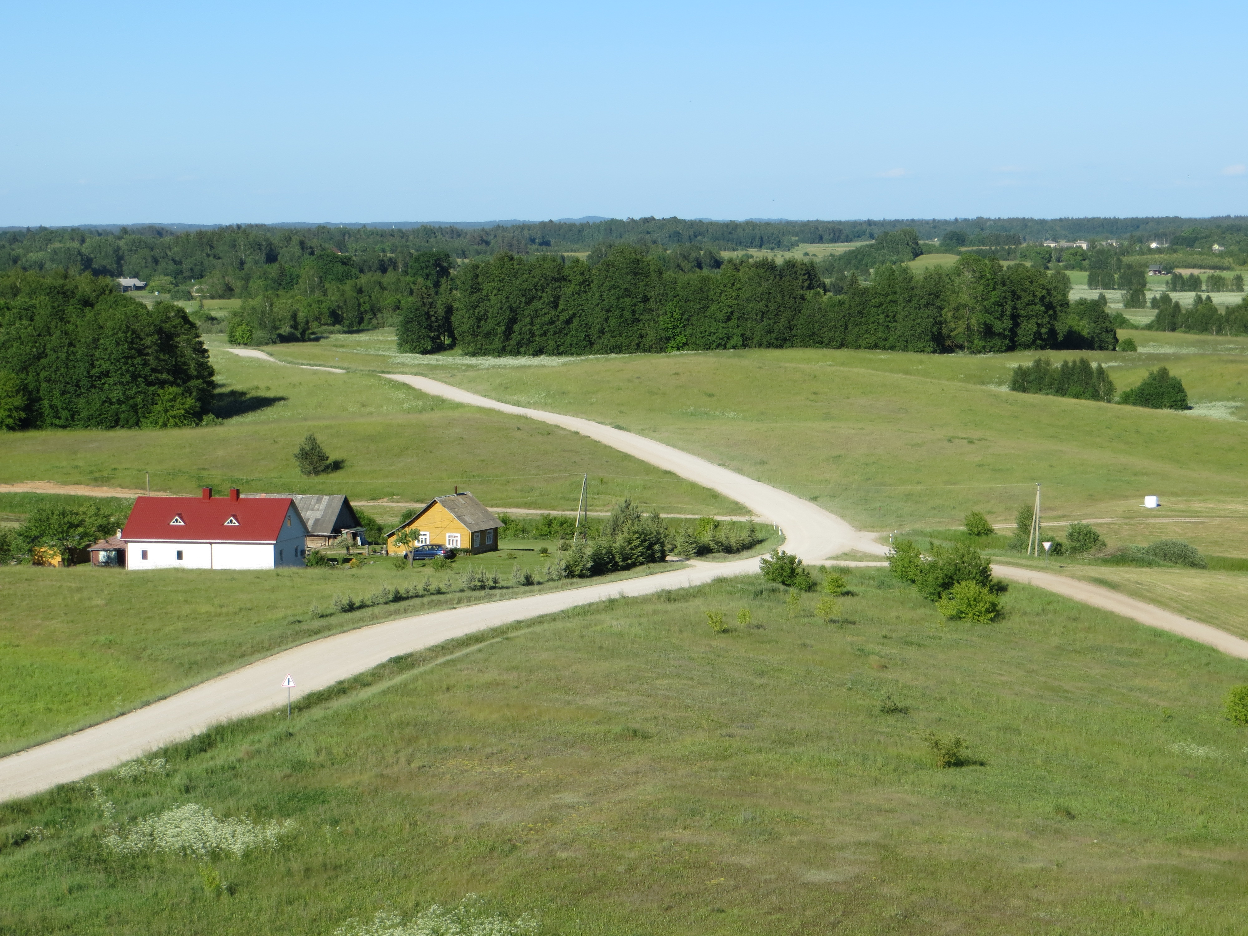 Suginčių sen., Lithuania